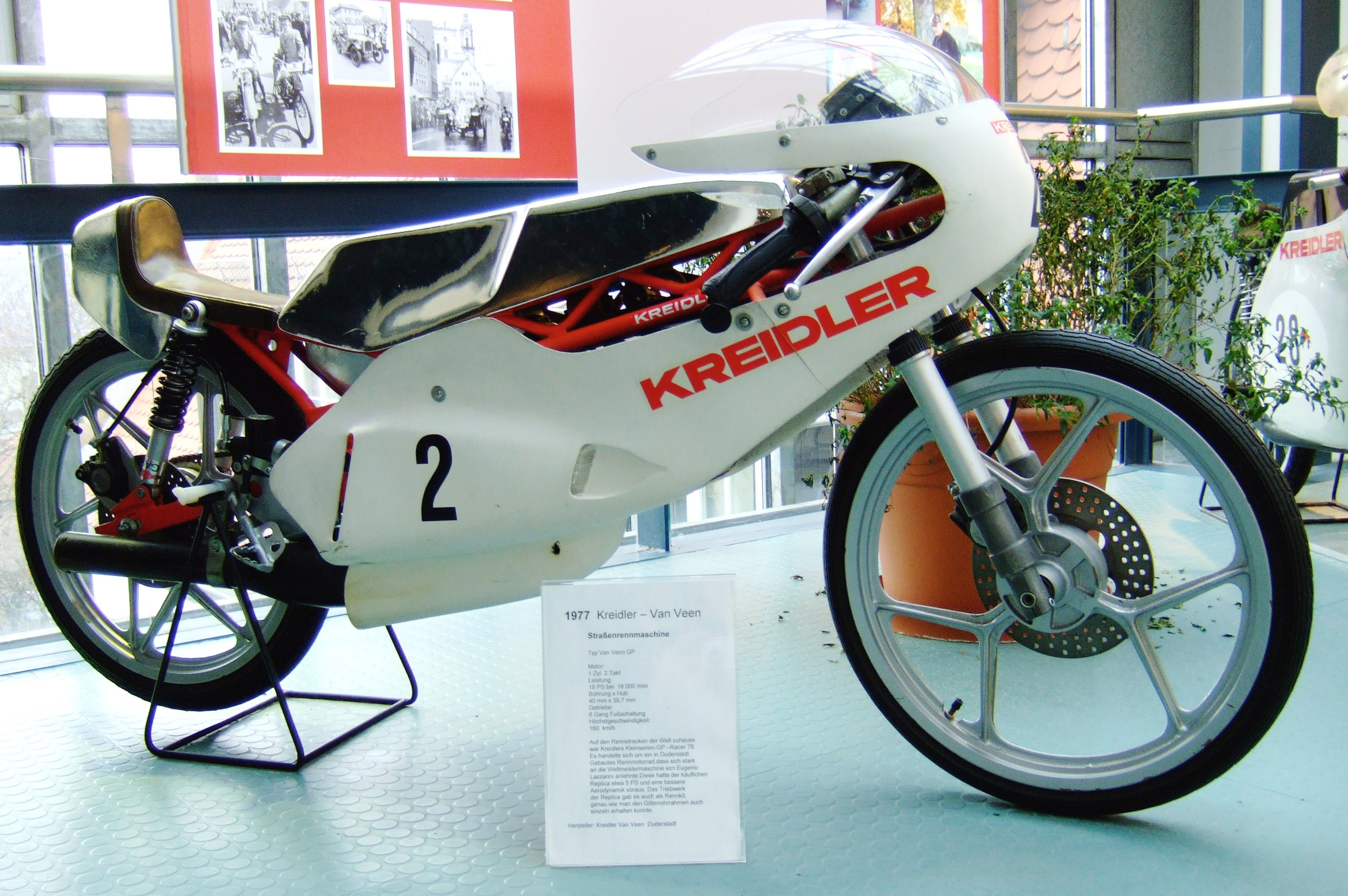 Motorbike "Kreidler Van Veen GP" (1977) at the Deutsches Zweirad- und NSU-Museum (18 PS bei 18.000 U/min., 160 km/h)